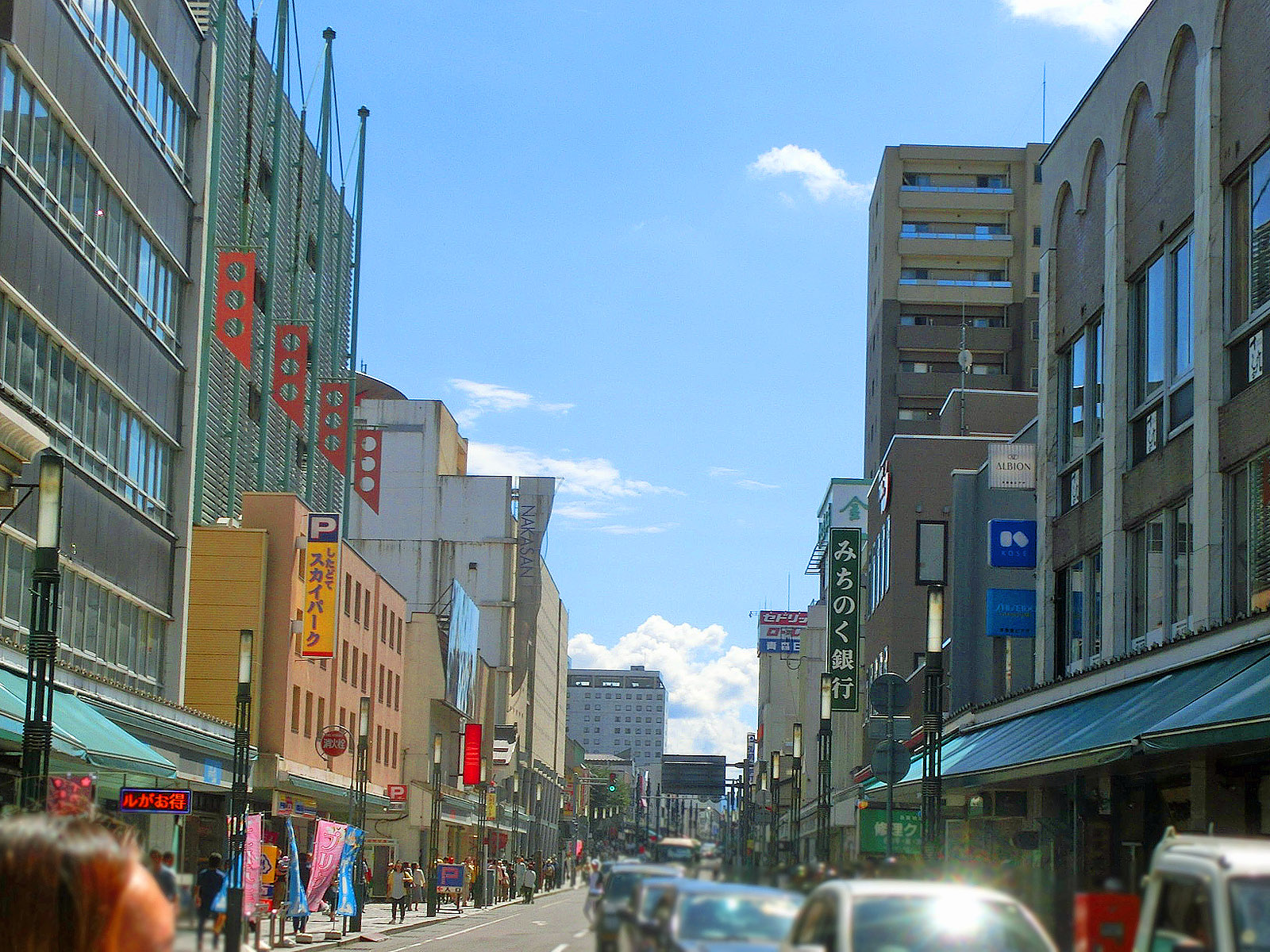 青森県弘前市土手町の様子。顔が判別される可能性がある箇所にぼかし処理を実施。